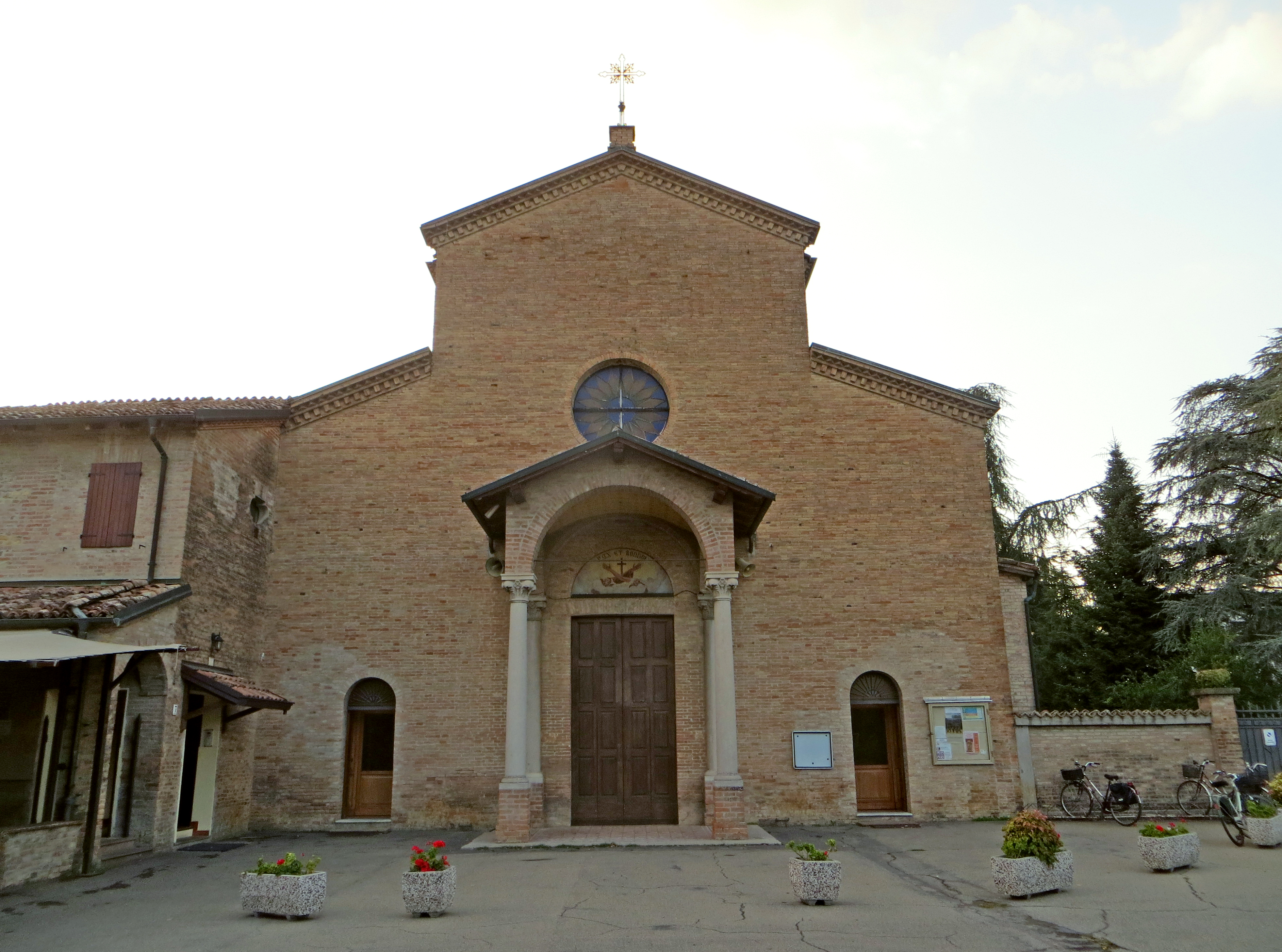 Chiesa del Sacro Cuore (Fidenza) - facciata